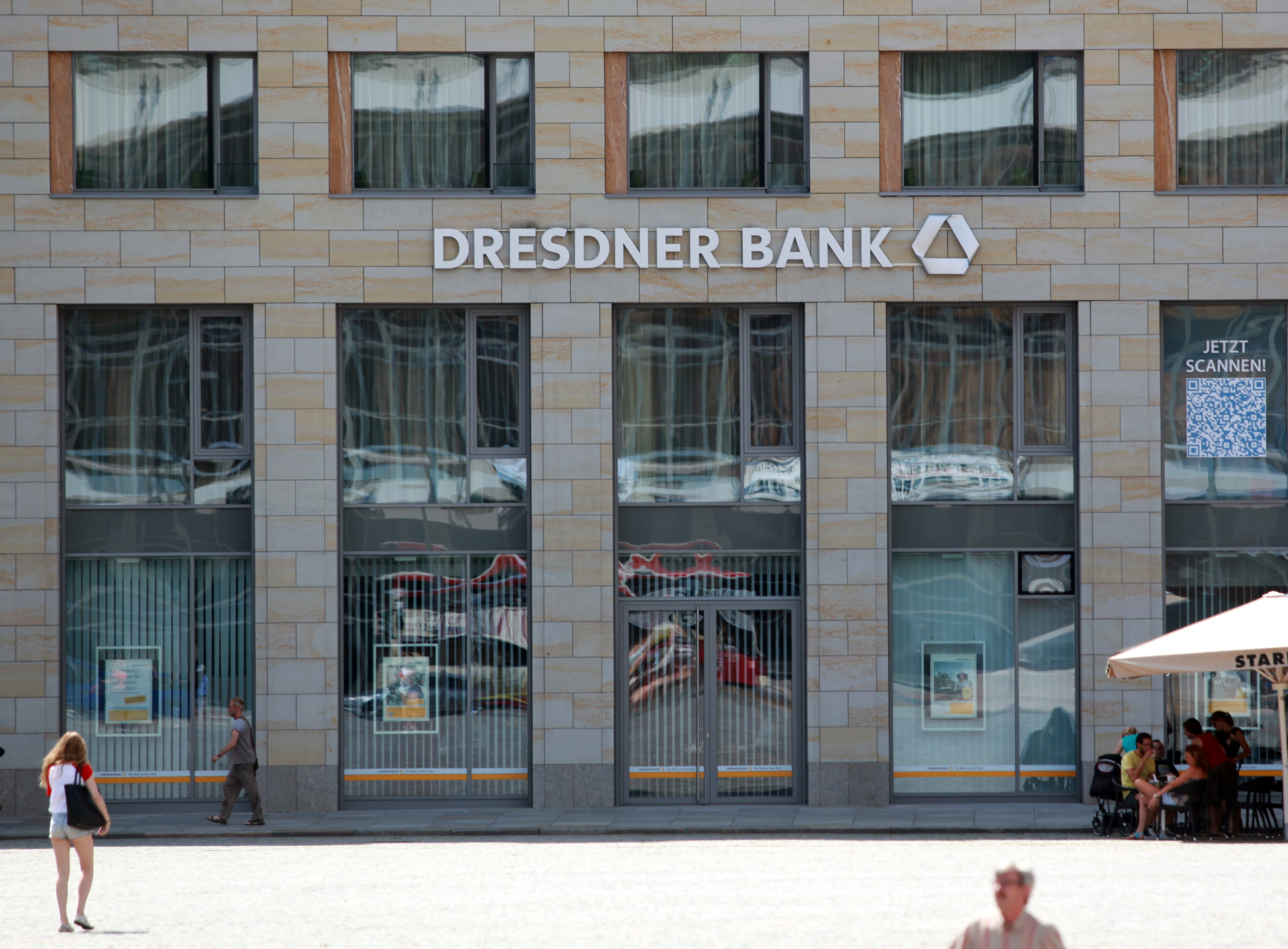 Filiale der Commerzbank am Dresdner Altmarkt mit dem Namen Dresdner Bank.